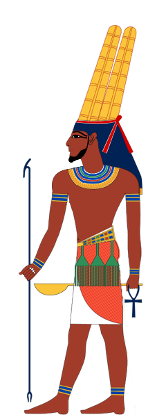 Sopdu (ou Septu, Sopedu ) era um deus do céu e das regiões fronteiriças orientais na antiga religião egípcia. Ele era o marido de Khensit.